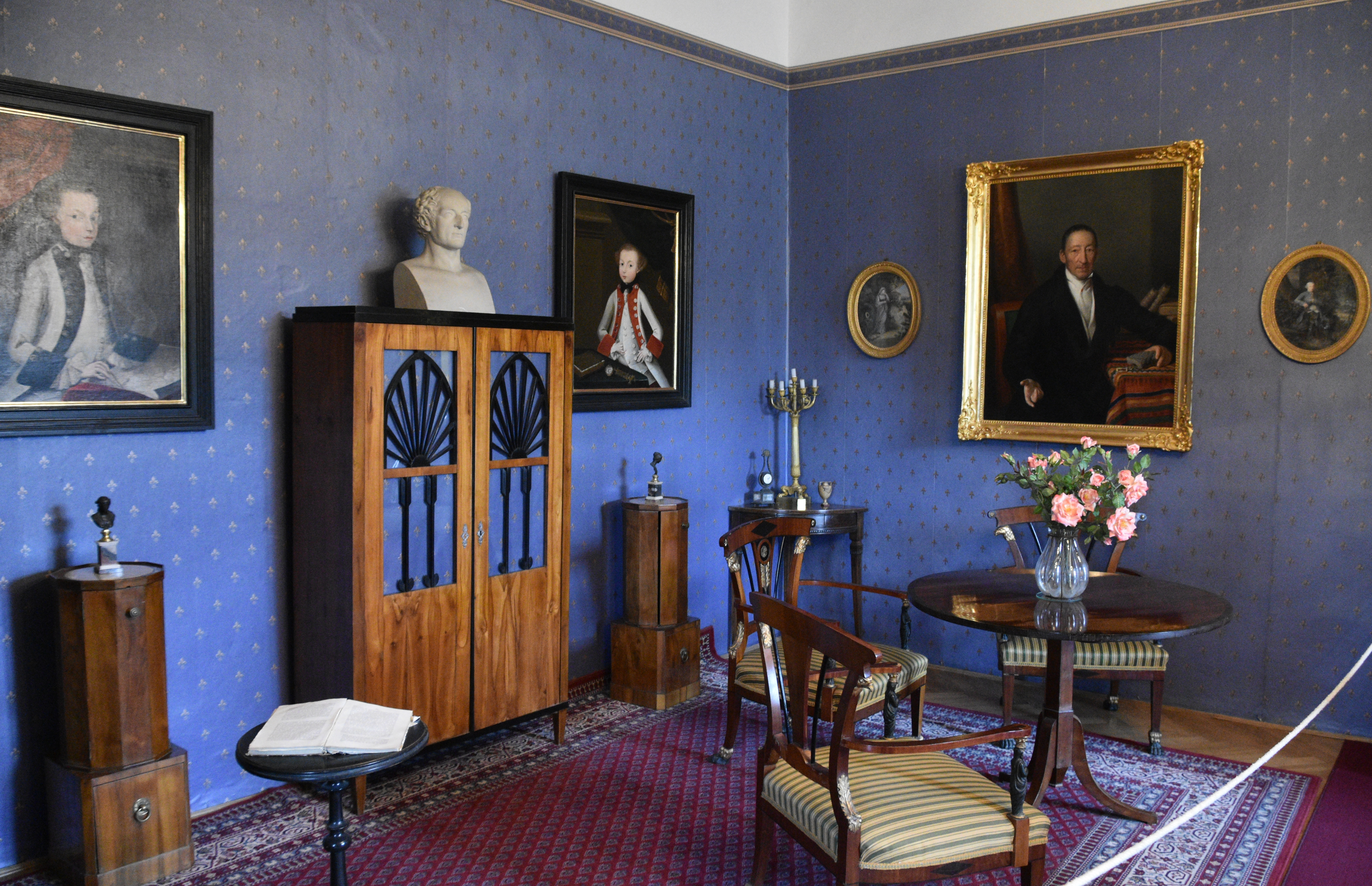 Cesky Sternberk Castle, interior (1)